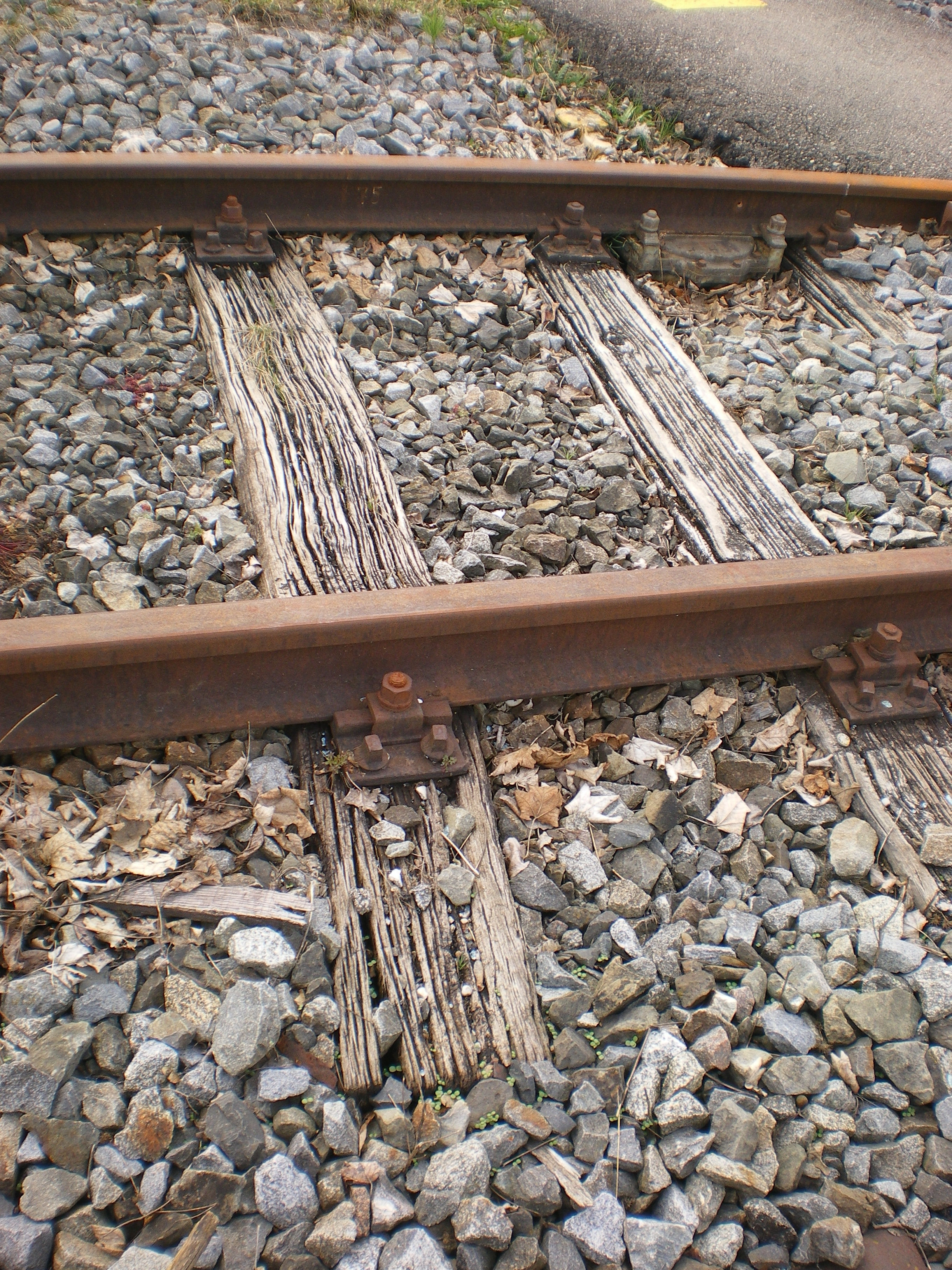 Hier sehen Sie eine Bahnschwelle der Staudenbahn. Sie befindet sich im Bahnhof Markt Wald kurz nach dem Bahnübergang und ist schon sehr morsch.